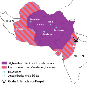 Ausdehnung und Einflussbereich Afghanistans unter Ahmad Schah Durrani